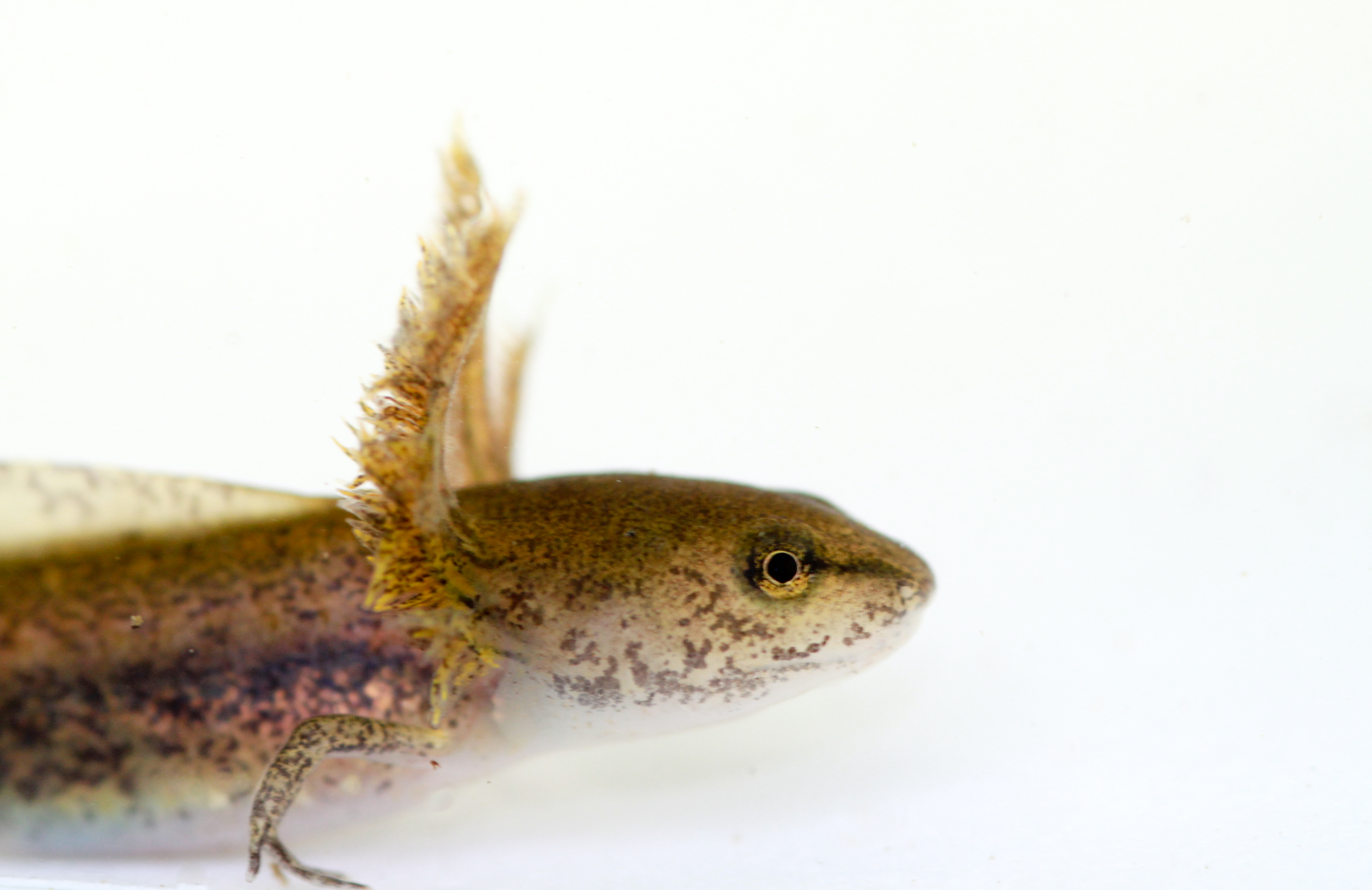 salamander larva closeup